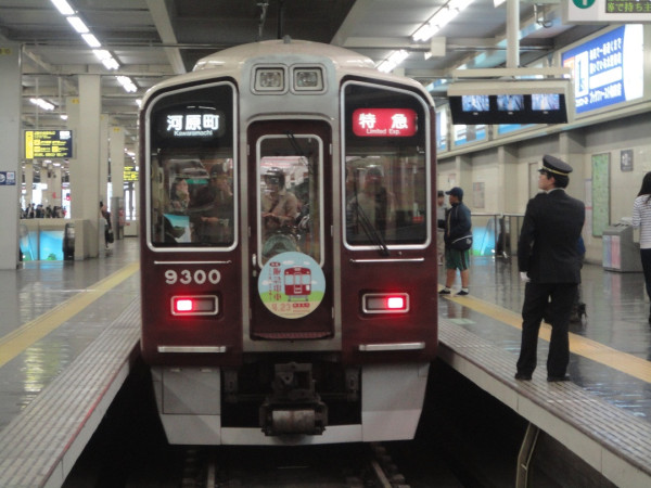 映画の宣伝ヘッドマーク掲出 2011年4月24日撮影 梅田にて9300F